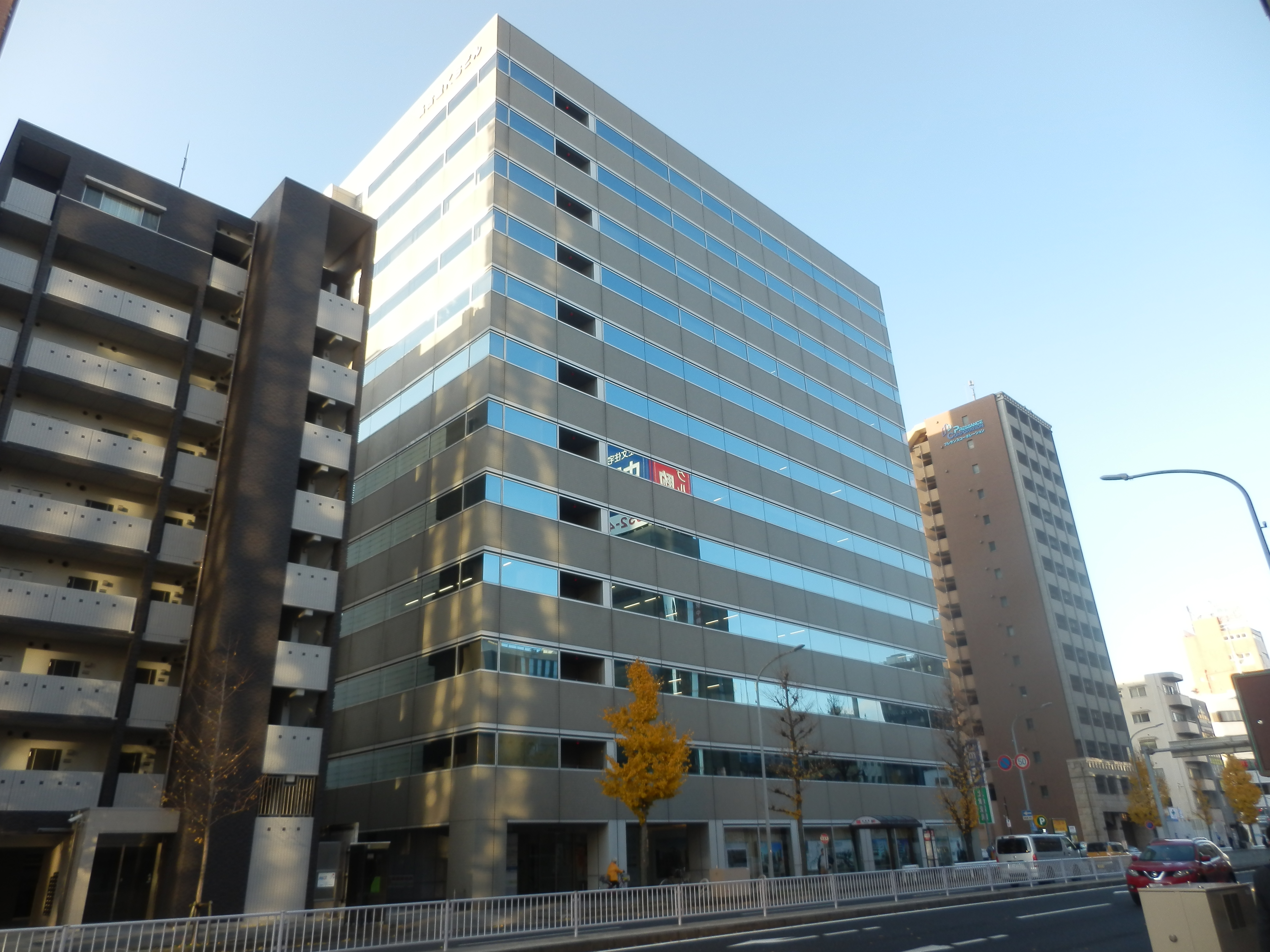 JR東海グループのジェイアール東海物流本社が入居する名古屋KSビル